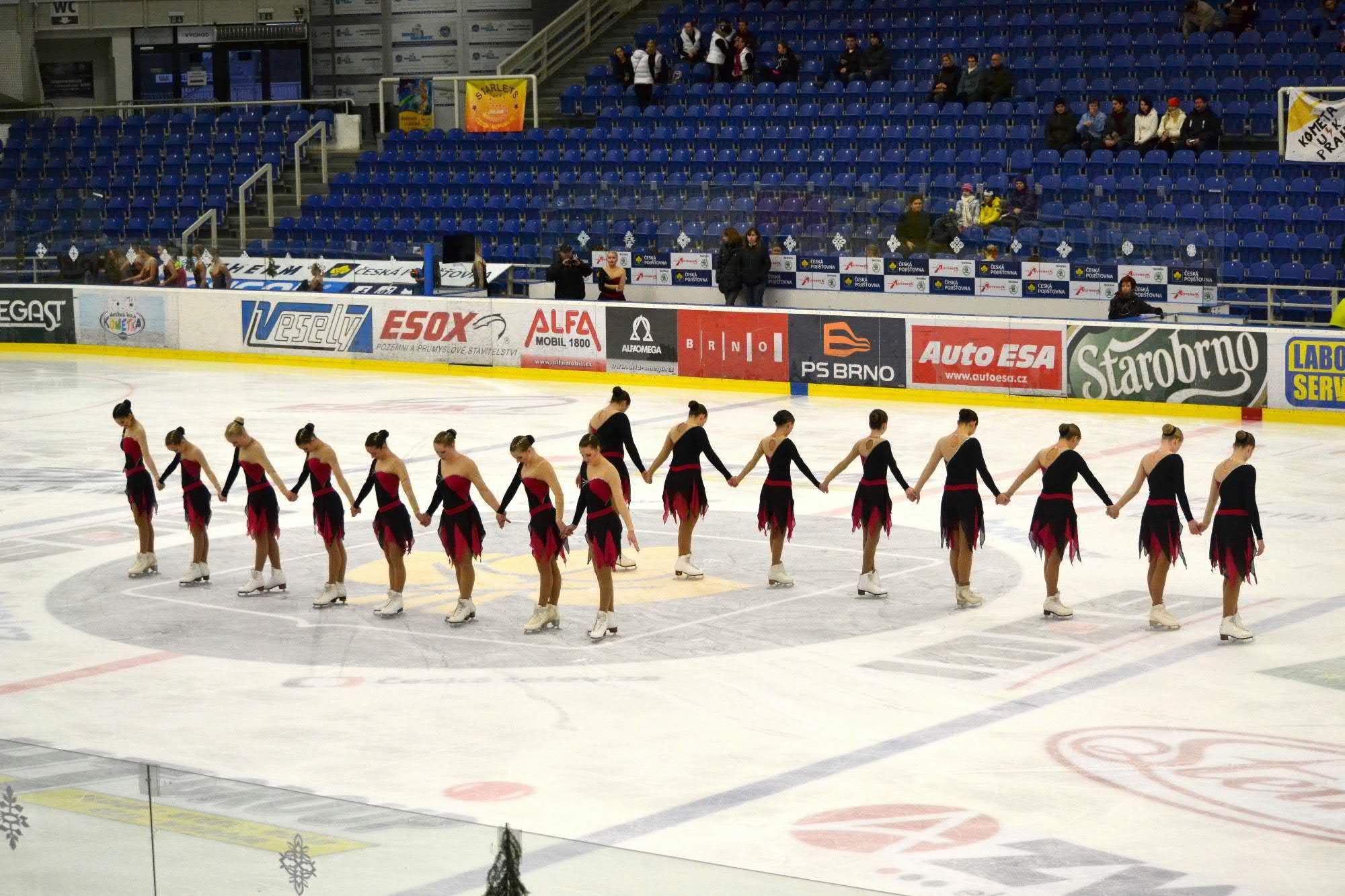 pardubický tým Orion